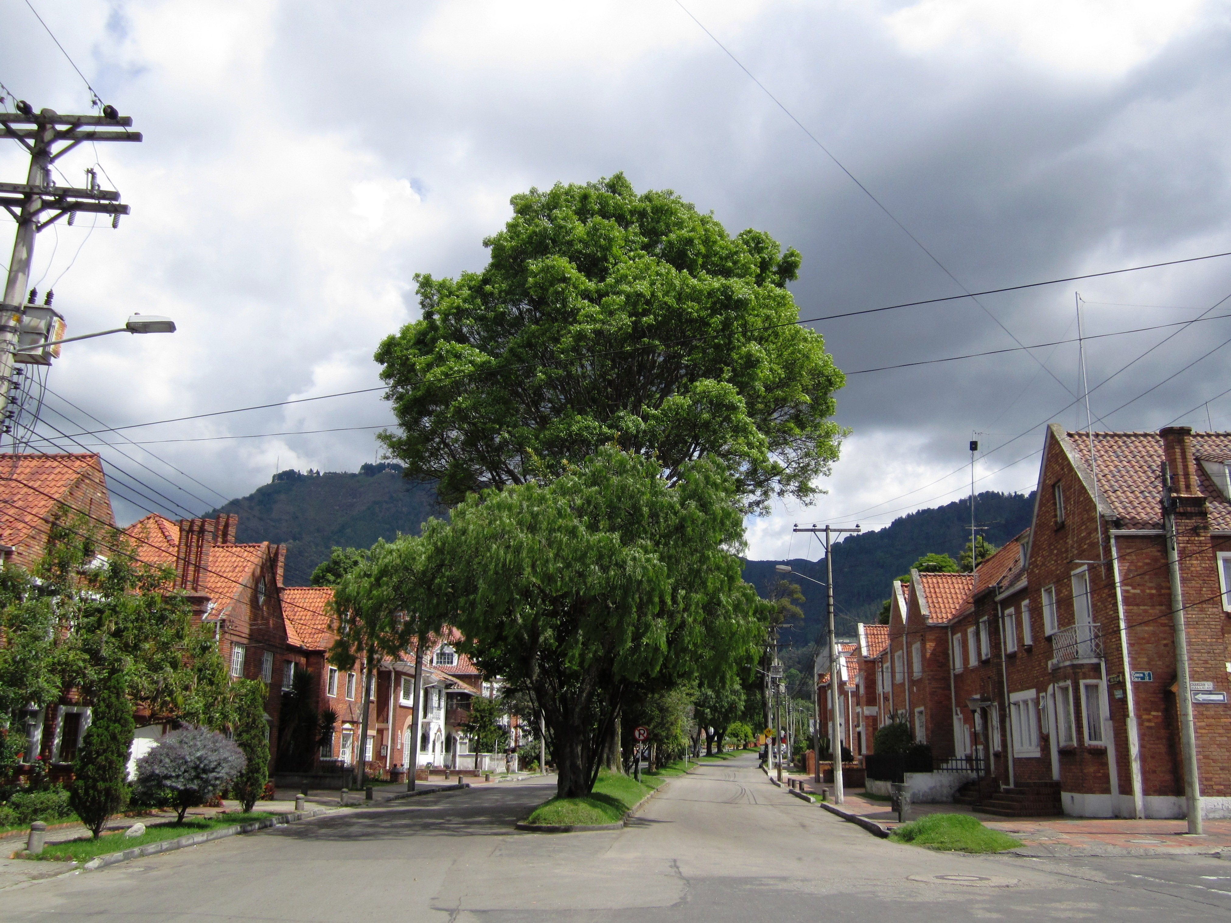 Calle en Teusaquillo calle 37 con carrera 17.